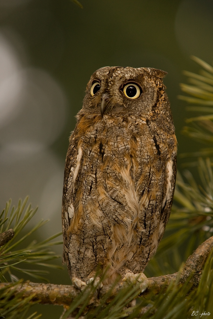 Otus scops, Herálec, Czech Republic